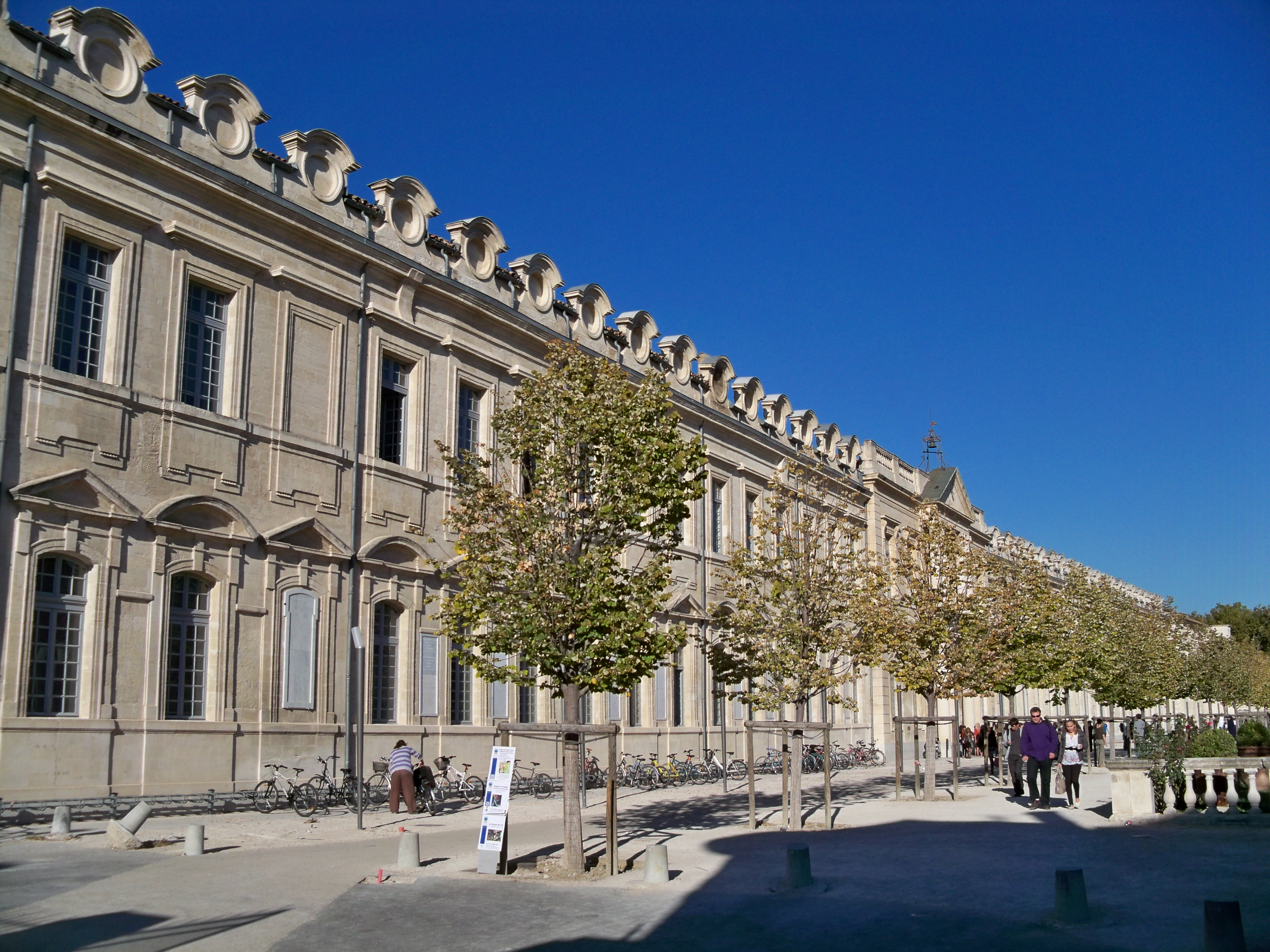 Université d'Avignon (Vaucluse)